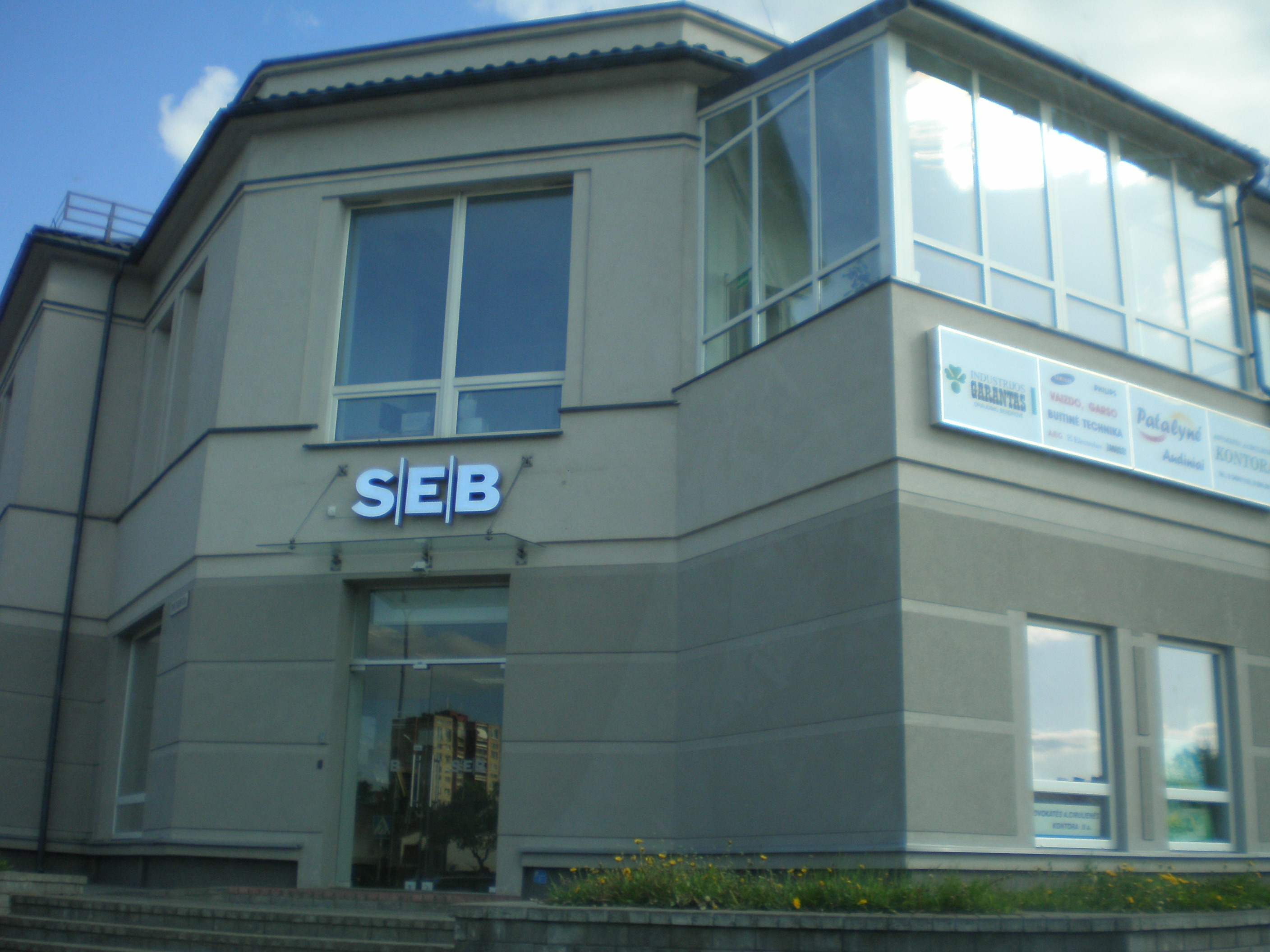 Jonavos verslo centras